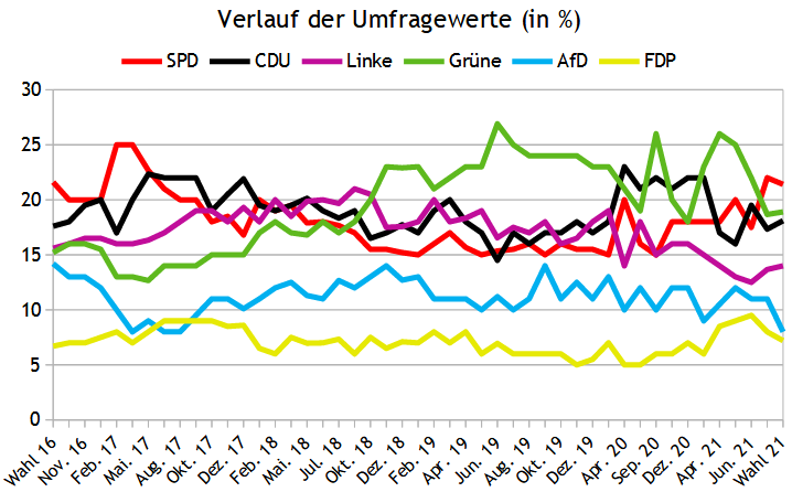 Umfragen zur Berlin-Wahl 2021